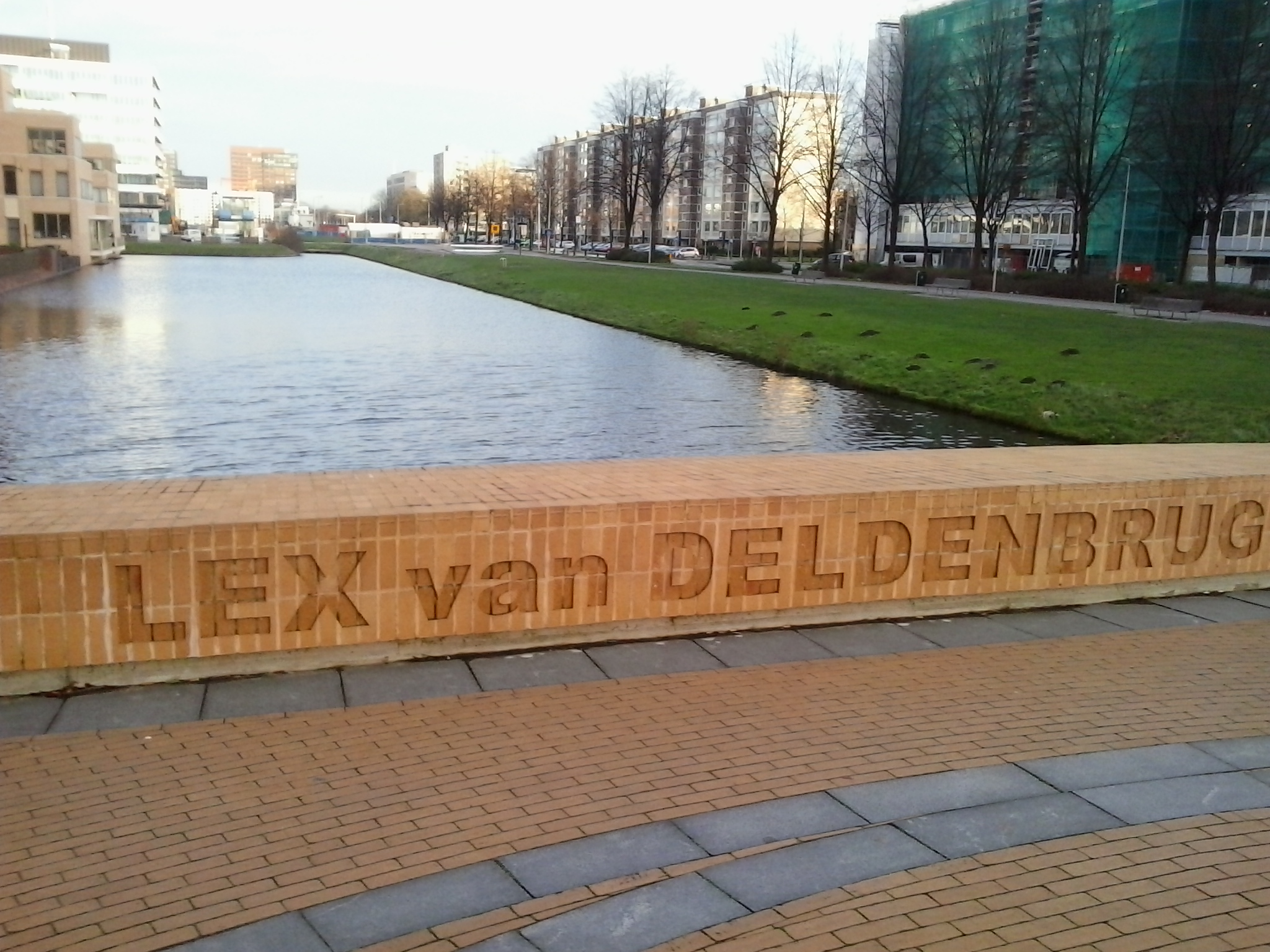 De Lex van Deldenbrug (808) uit 2013, ontworpen door Liesbeth van der Pol. Over de nieuw gegraven De Boelegracht, tussen het George Gershwinplein (Zuidas) en De Boelelaan in Amsterdam-Buitenveldert, kijkend in oostelijke (ozo) richting.